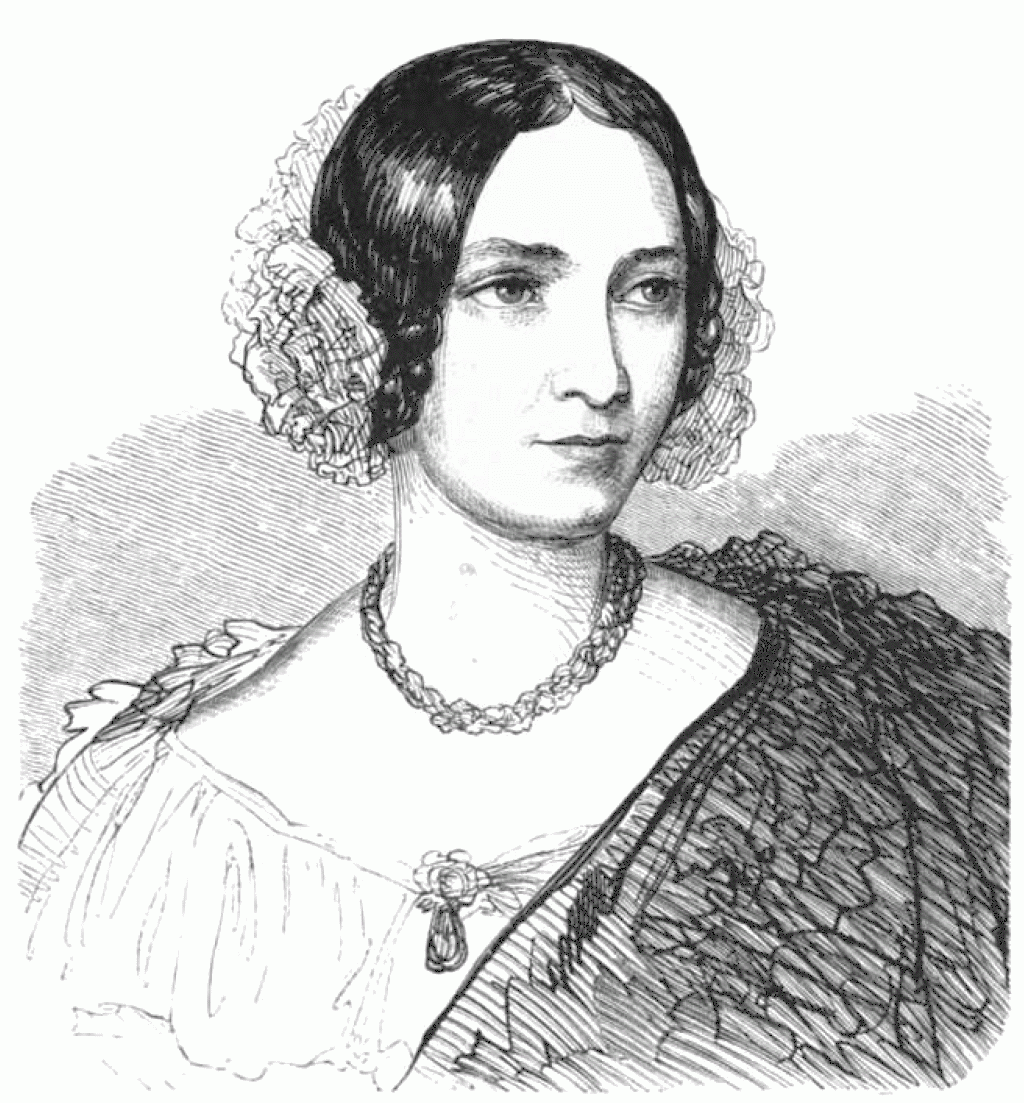 Julie Gräfin Oldofredi-Hager (1813-1879), Austrian poet